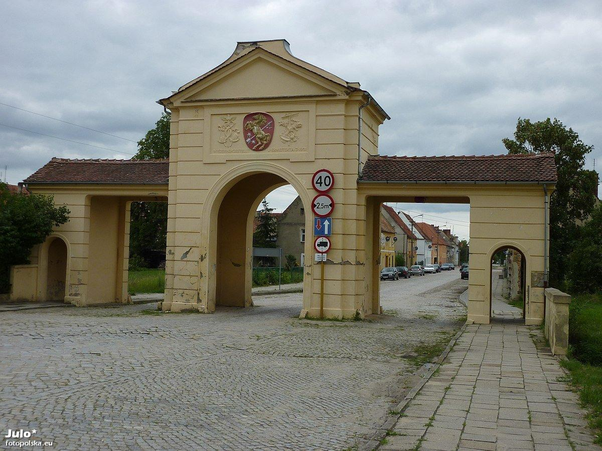 Brama nad wjazdem w ulicę (dziś nosi nazwę ul. Wolności) prowadzącą w stronę pałacu Brühlów. Jak głosi napis, bramę zrekonstruowano w 1931.